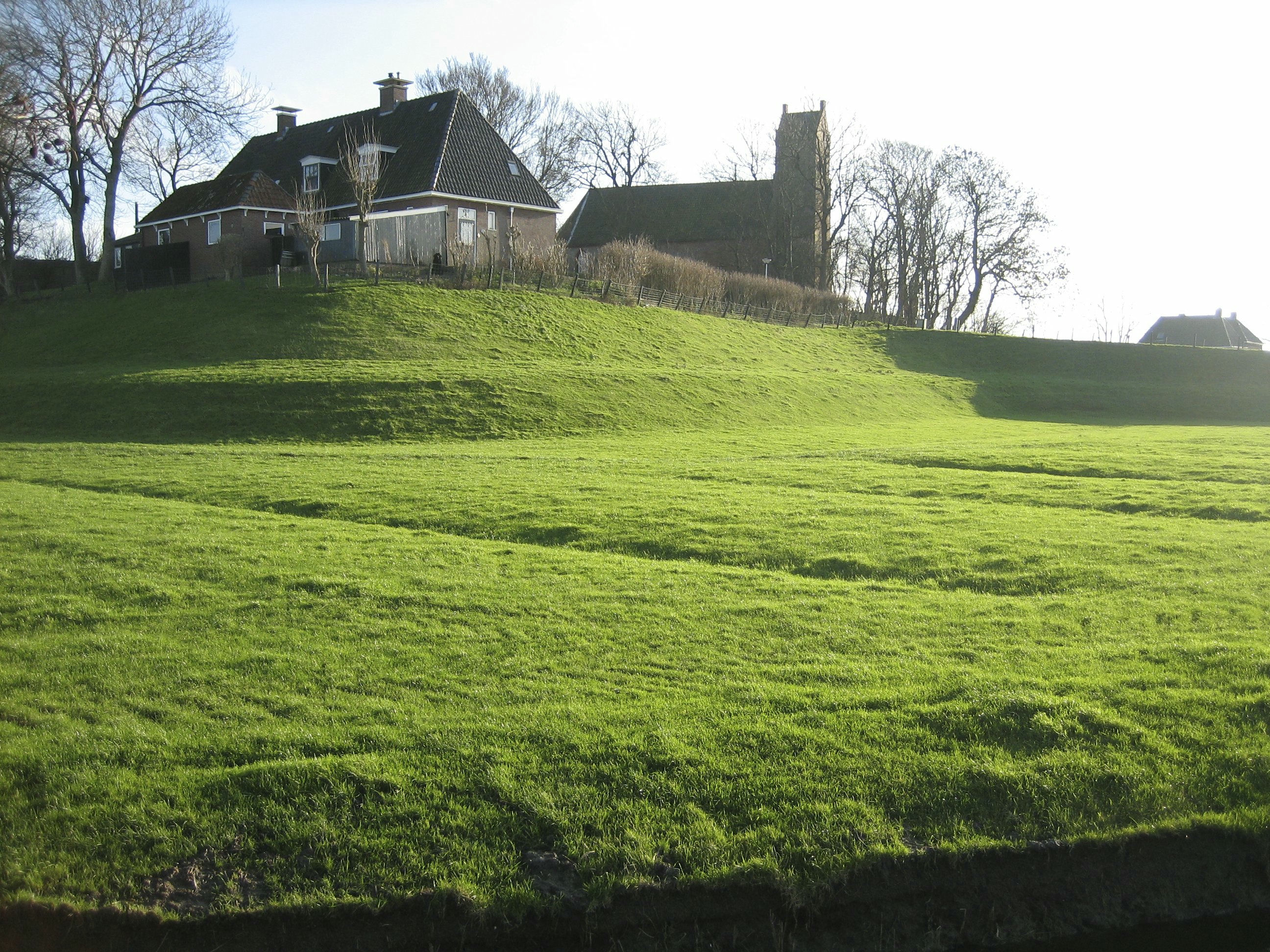 Archeologie/ Terp: Zicht op de terp van Hogebeintum richting kerk, Archeoregio 7 (opmerking: Publicatie Uit Balans 2006)